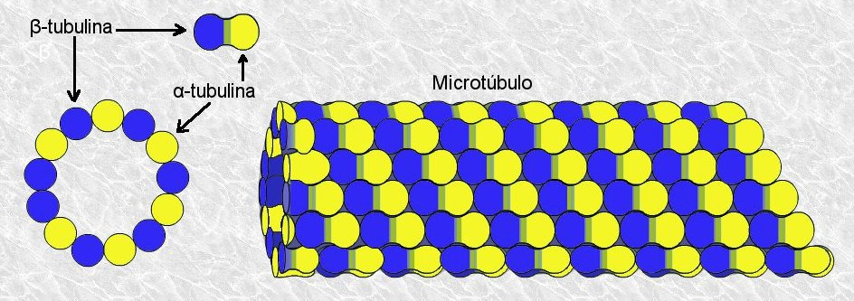 Estructura de los microtúbulos del citoesqueleto.